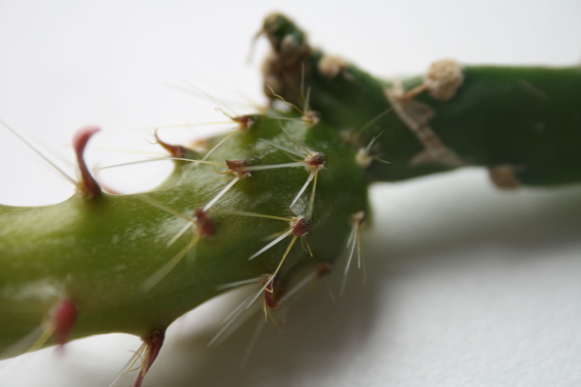 Disocactus X hybridus (Hylocereeae; Cactaceae; Planta) kaktusz virágának pericarpiuma